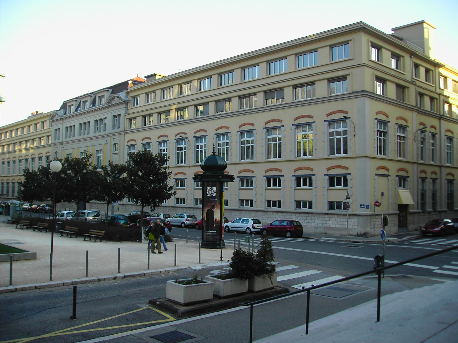 Institut National Polytechnique Grenoble